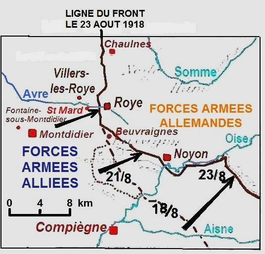 Carte partielle de la grande offensive des Alliés dite "Offensive des Cent-Jours" entre Amiens et Mons à partir du 8 août 1918.